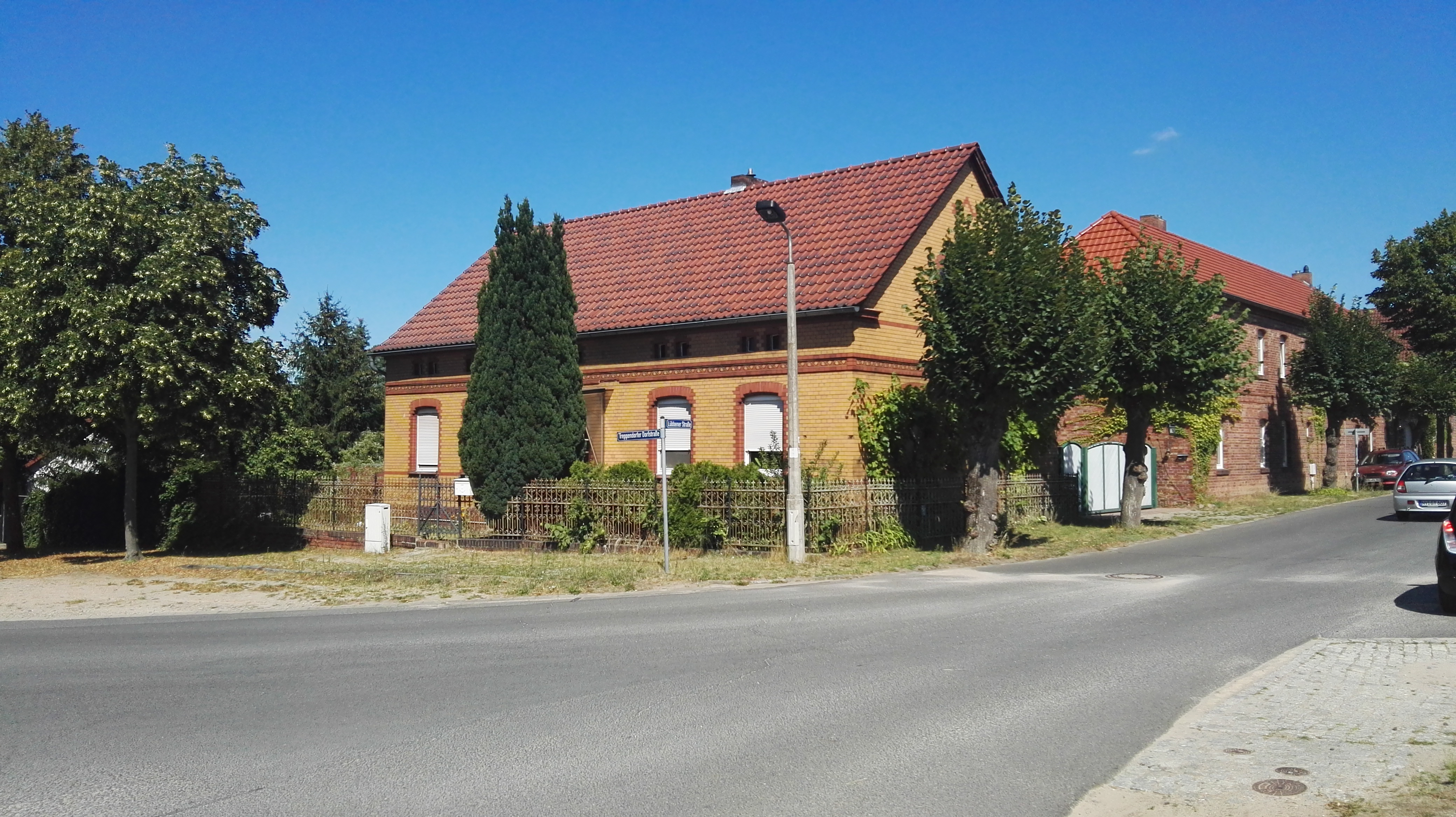 Bauernhäuser in Treppendorf OT von Lübben (Spreewald) Ecke Treppendorfer Dorfstraße/LÜbbener Straße